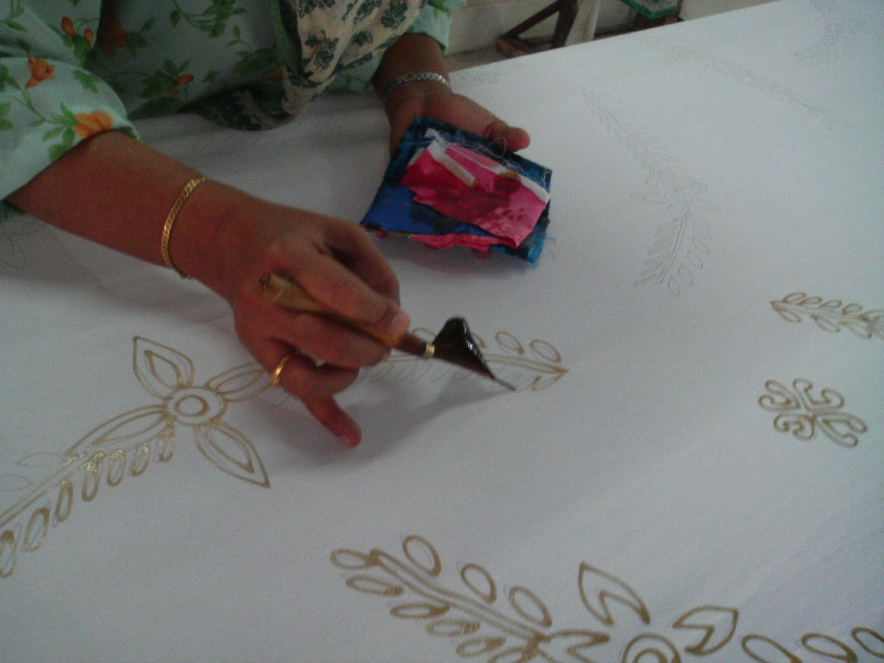 Drawing of Malaysian Batik.